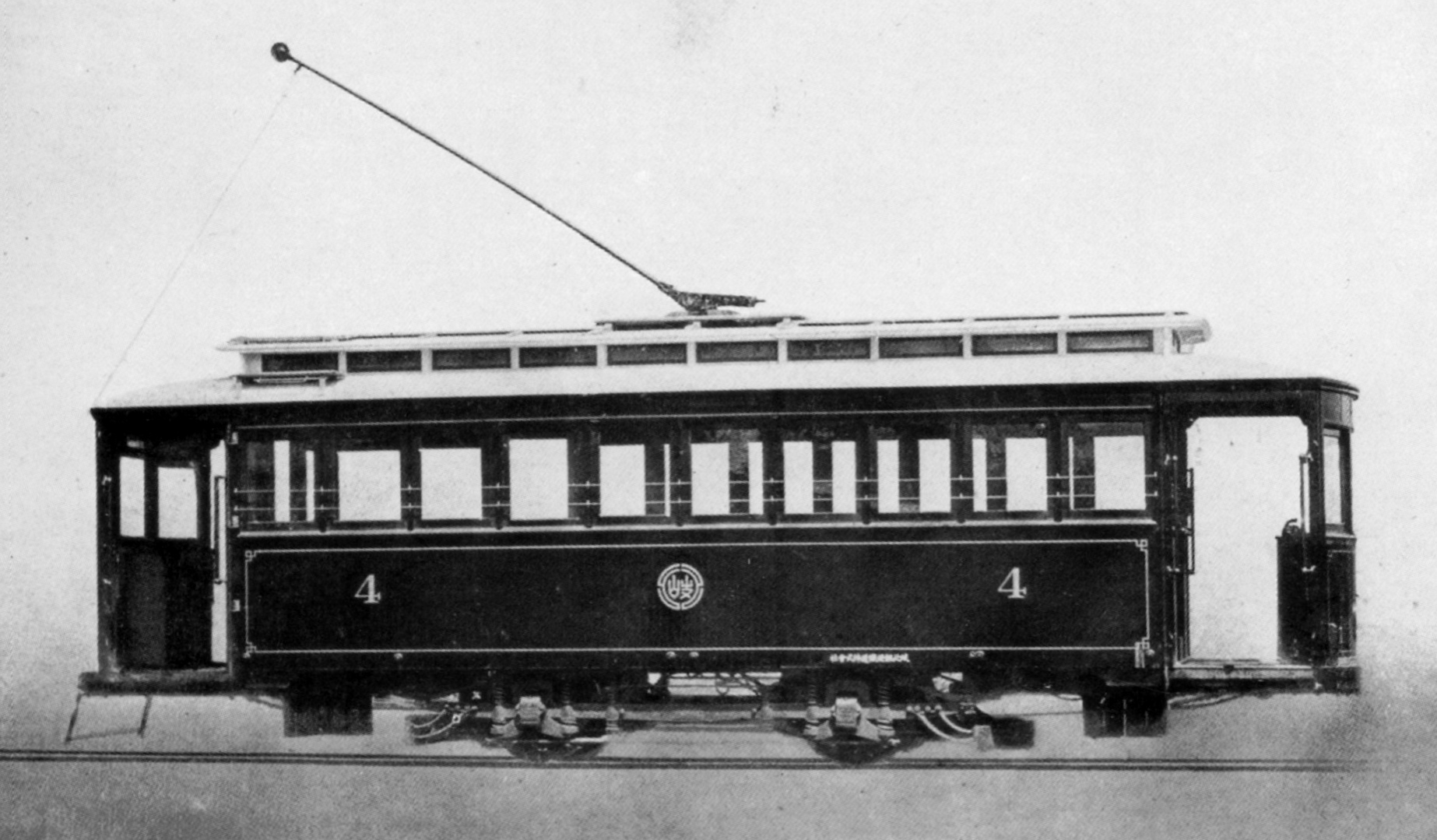 岐北軽便鉄道4号。